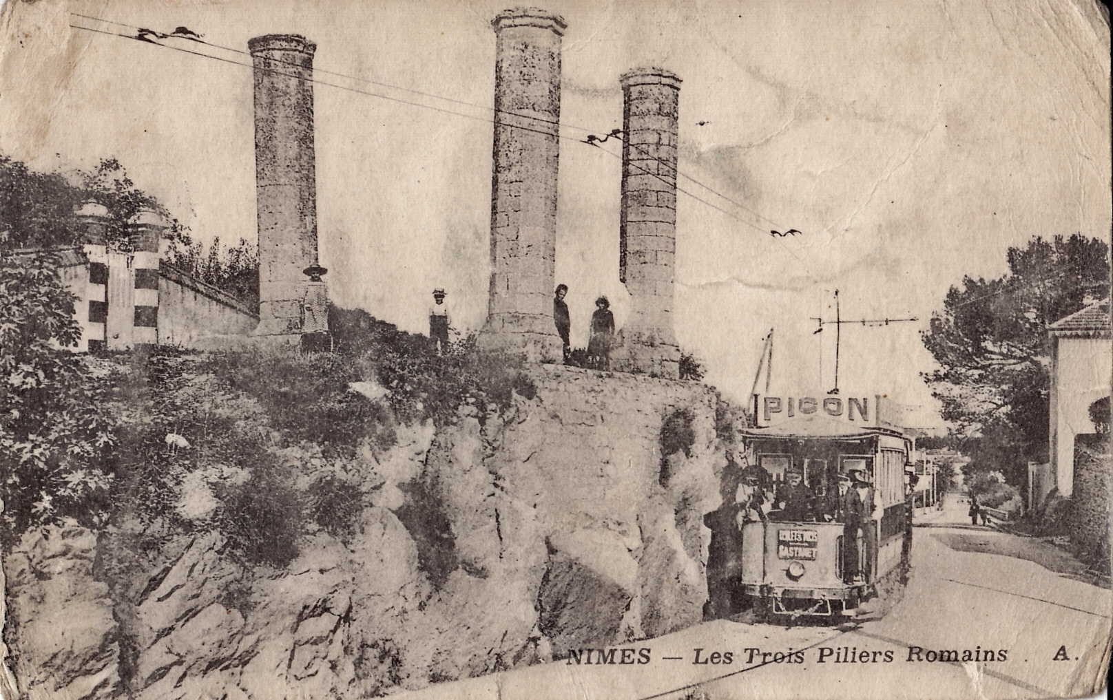 Carte postale ancienne éditée par A. :NÎMES - Les Trois Pilliers Romains